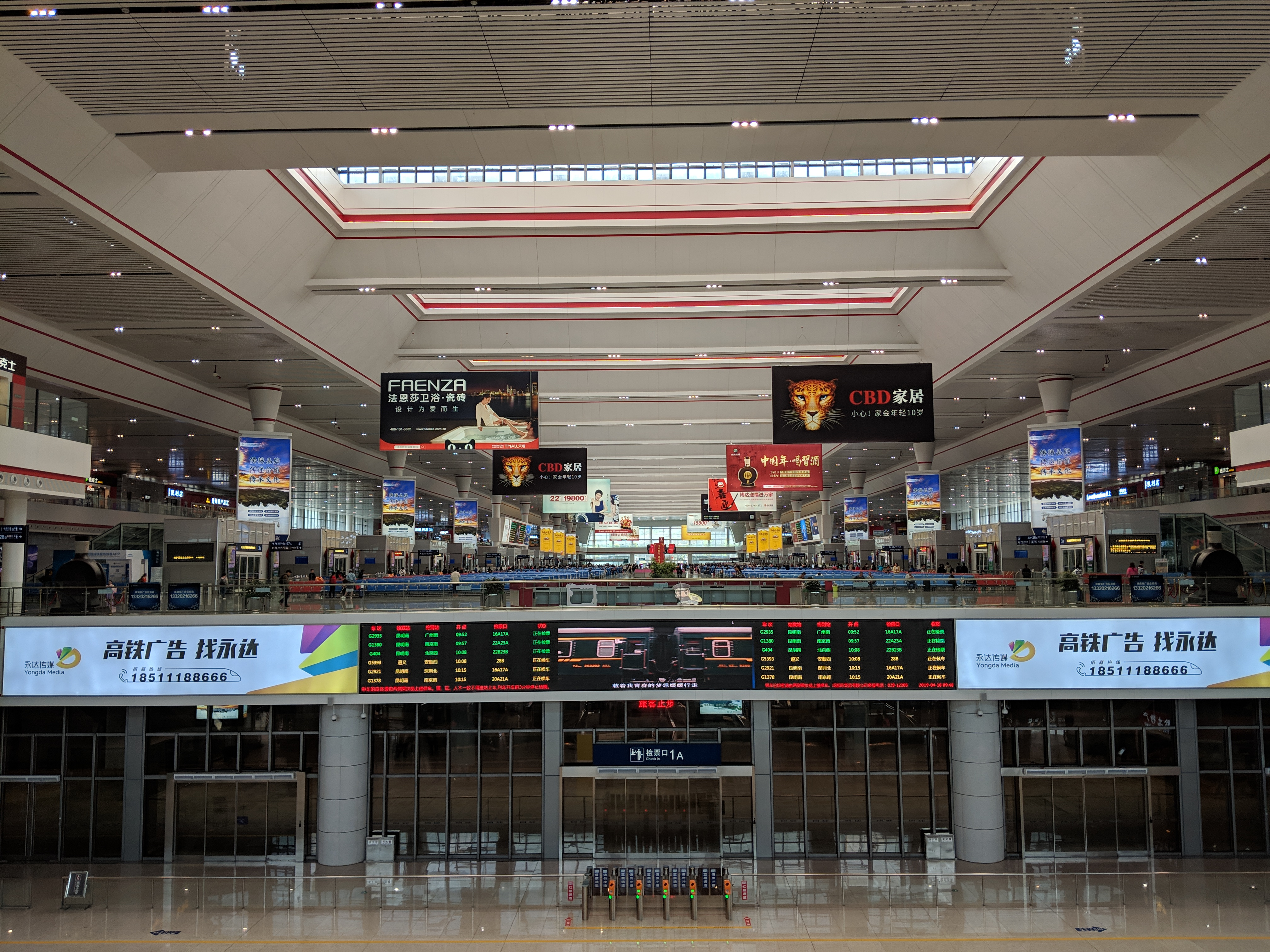 中文（中国大陆）: 贵阳北站候车大厅